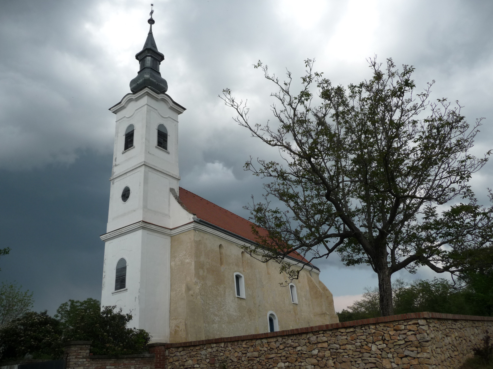 Ref. templom (Túrony, Kossuth u.) This is a photo of a monument in Hungary. Identifier: 1995